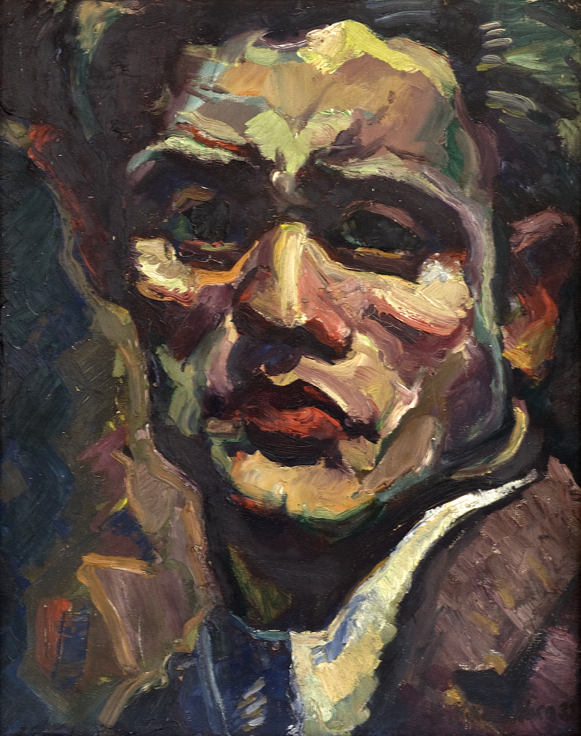 Selbstportrait von H. Schlüschen